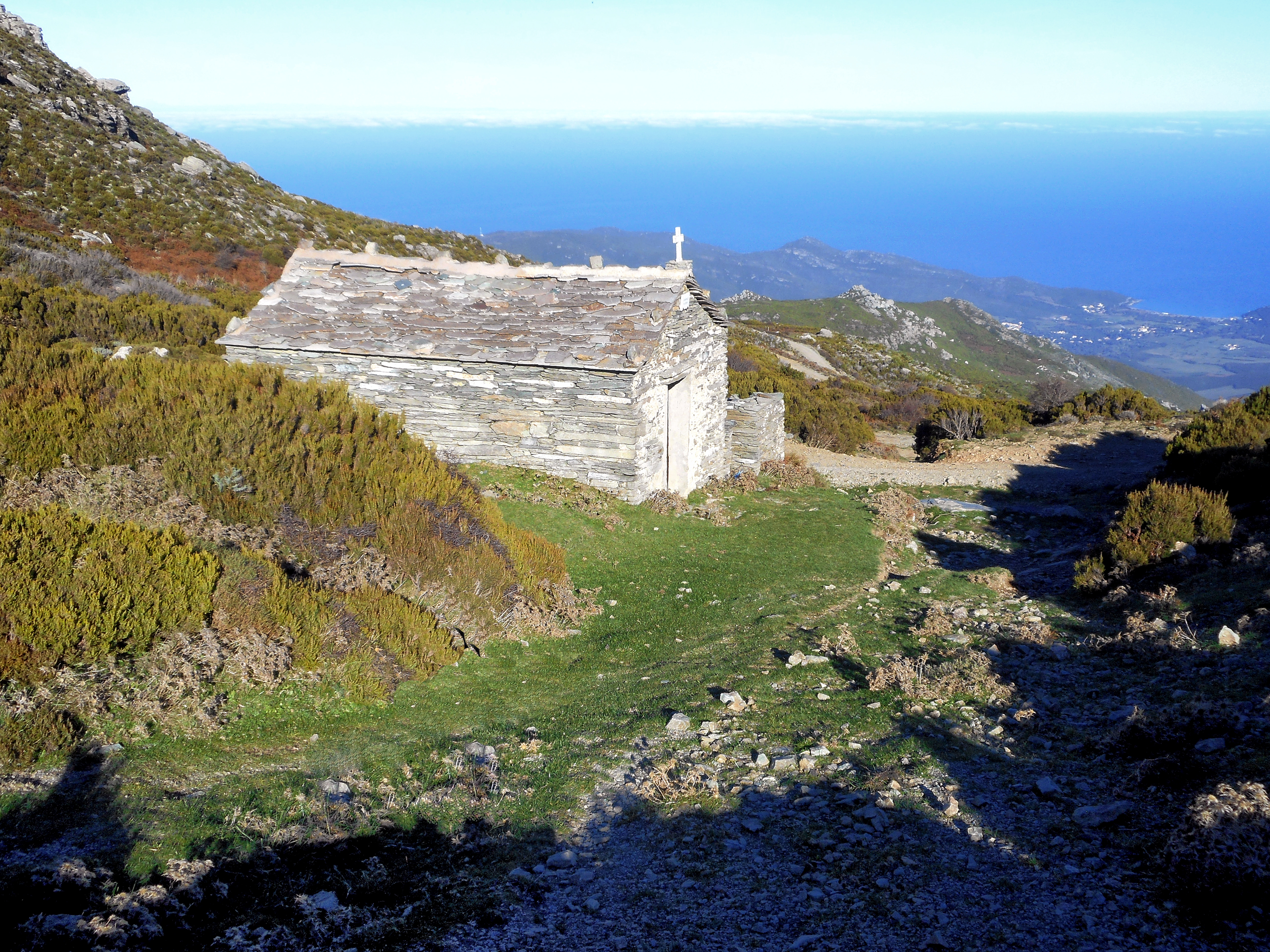 Sisco, Cap Corse (Haute-Corse) - Chapelle rurale San Giuvanni (San Ghjuvanni Evangelista ou Saint-Jean l'Évangéliste) à la bocca di San Giuvanni (959 m), col séparant Olcani de Sisco.